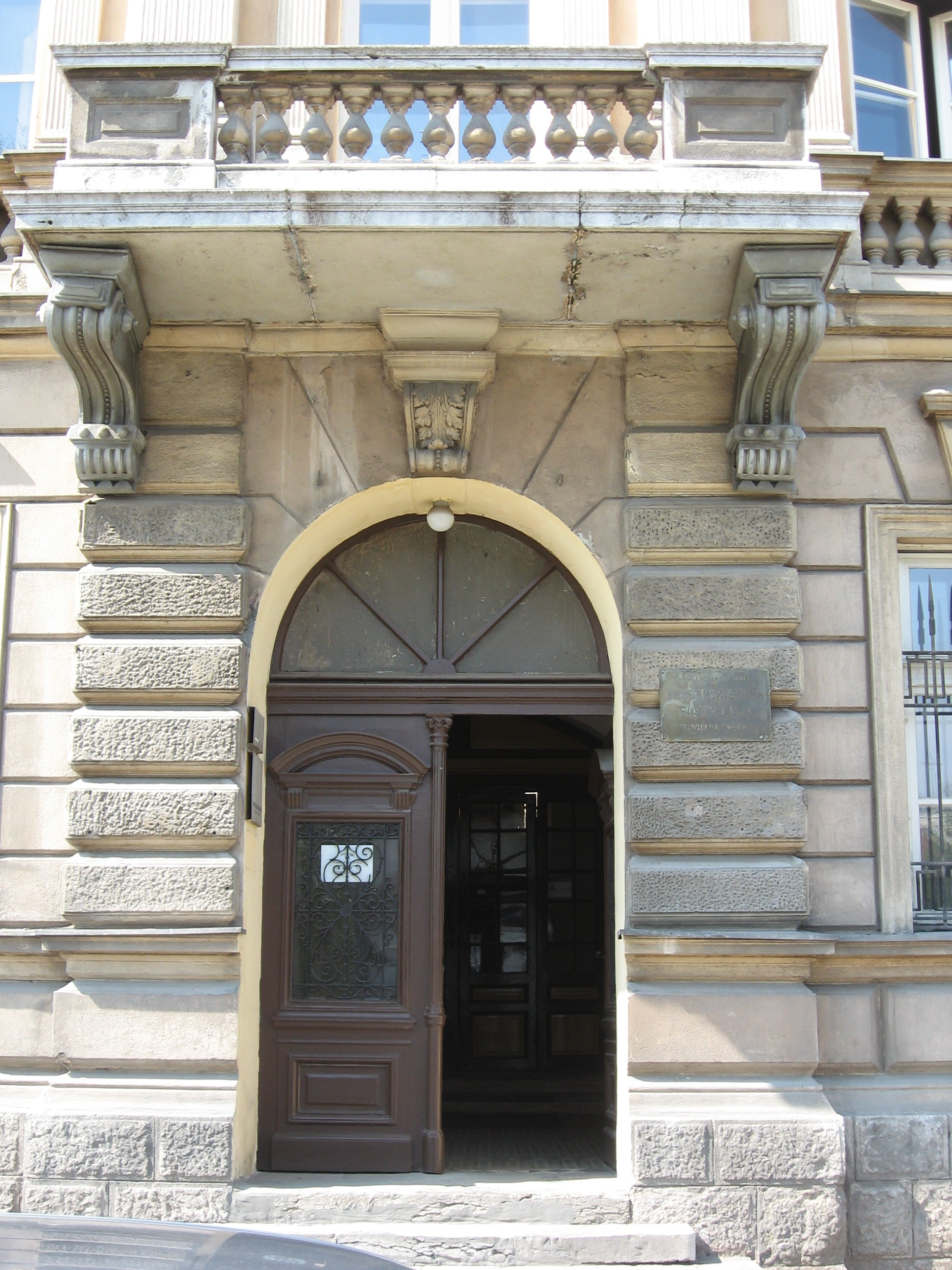 Универзитетска библиотека Никола Тесла у Нишу